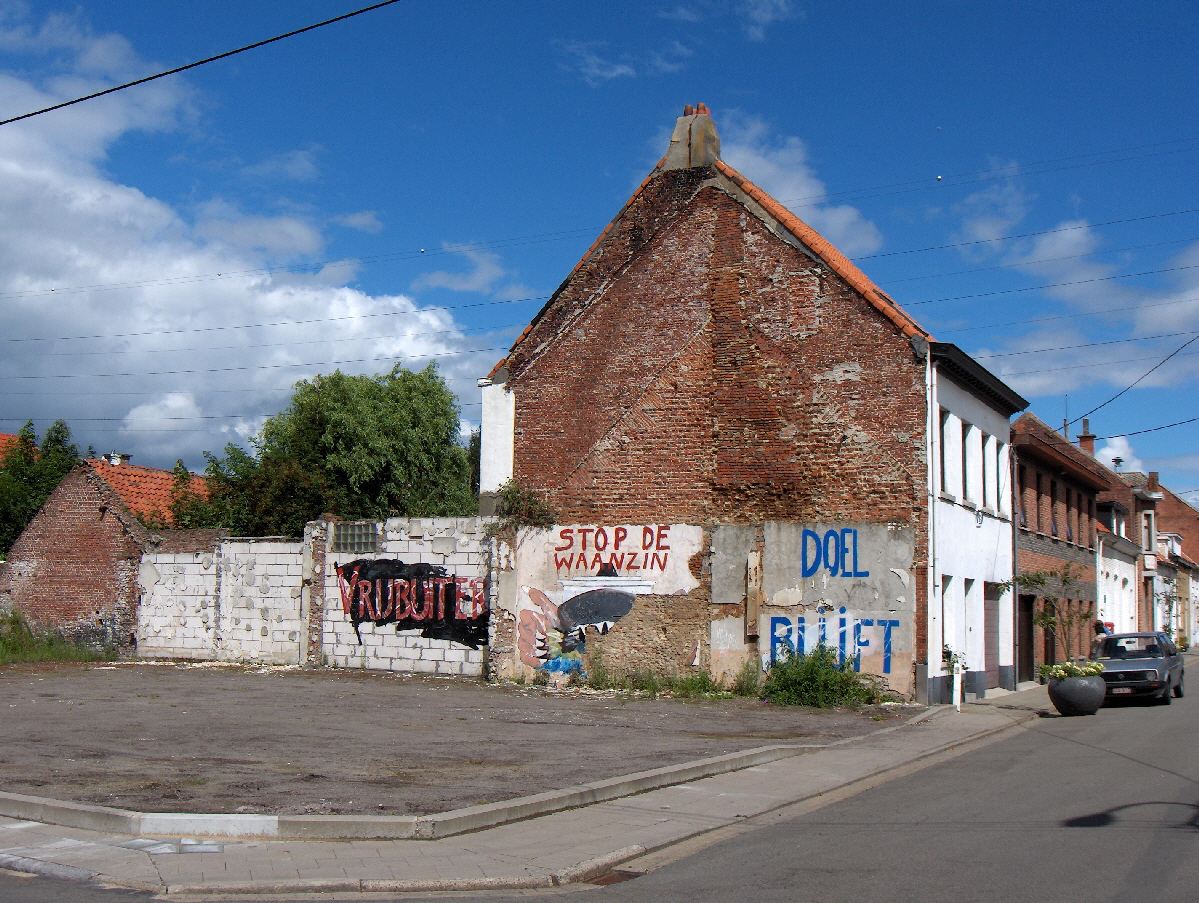 Bild: Doel (Belgien), Protestgraffiti anlässlich der geplanten Räumung des Dorfes. Fotograf: Friedrich Tellberg Datum: 7. August 2005